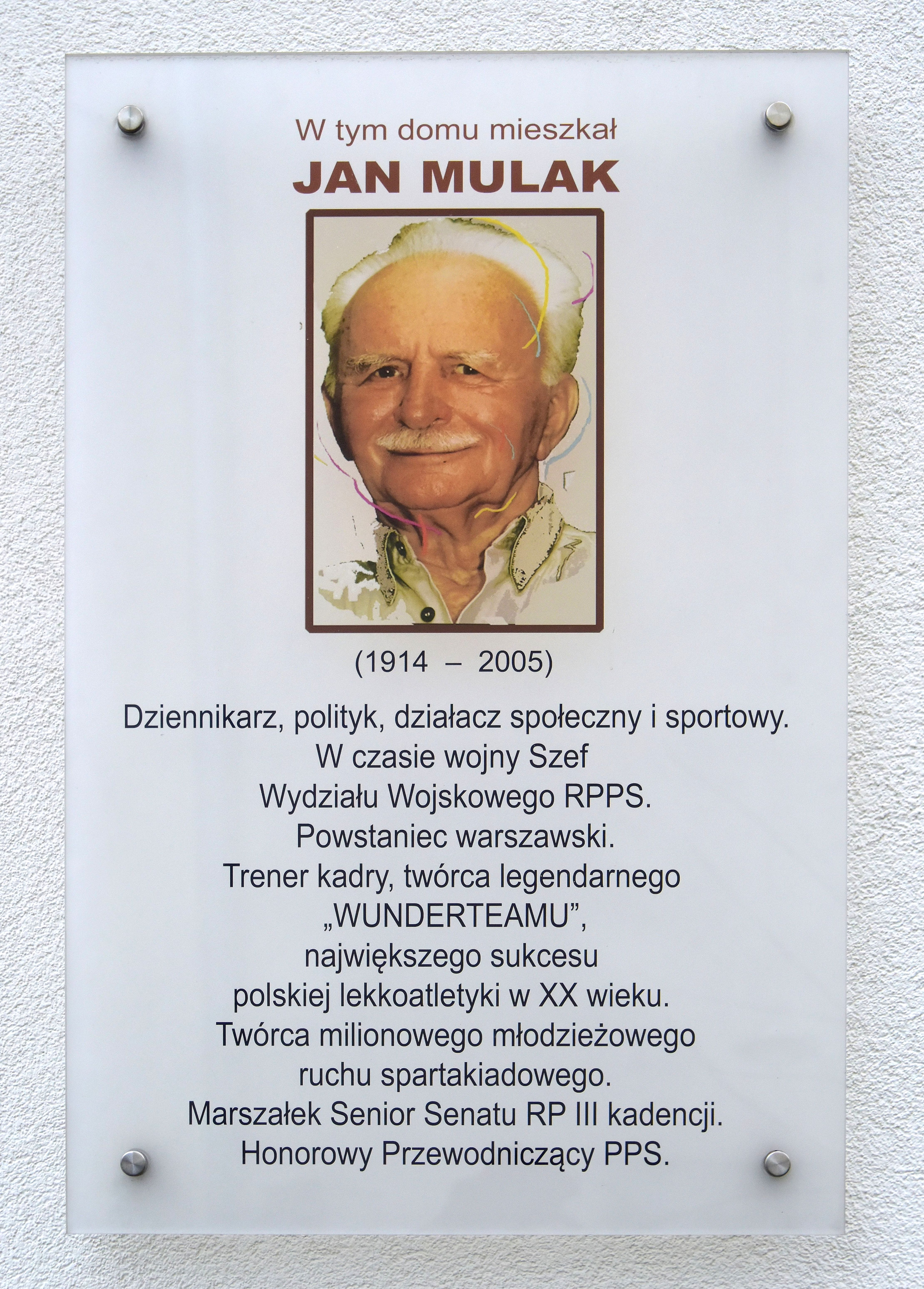 Tablica upamiętniająca Jana Mulaka przy ul. Krasińskiego 18 w Warszawie